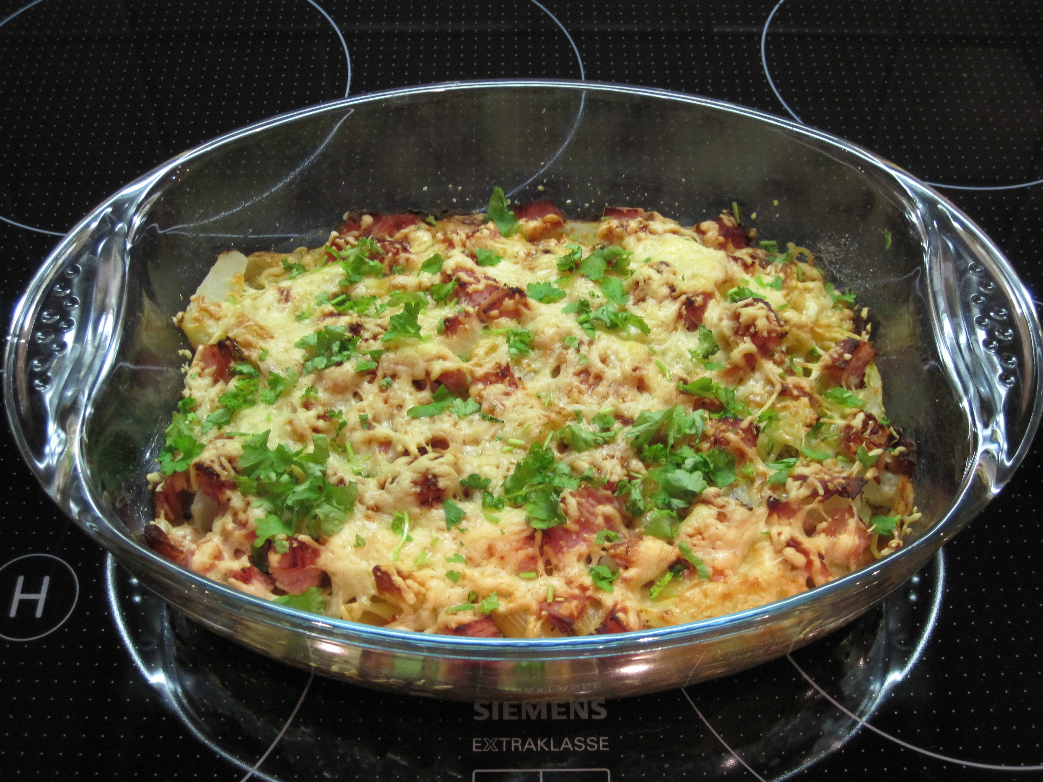 Auflauf mit Kohlrabi und Schinken